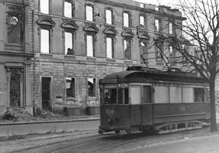 Zentralbild-Be-Ri.-5.10.1963- Das im II. Weltkrieg zerstörte Potsdam. Aufnahme 1945. UBz.: Ruinen in einer Straße und die notdürftig wetterfest gemachte Straßenbahn.